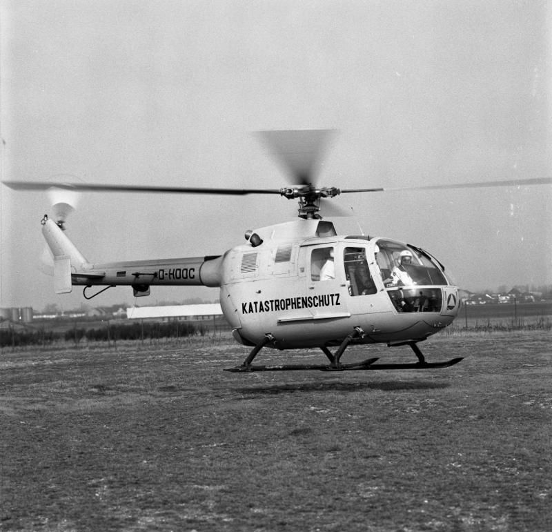 Zivilschutz, Hubschrauber MBB Bo 105 1974 1.3. Hangelar Kat.s. Rettungshubschrauber [Zivilschutz, Rettungshubschrauber des Katastrophenschutz Messerschmitt-Bölkow-Blohm Bo-105 (D-HDOC)]